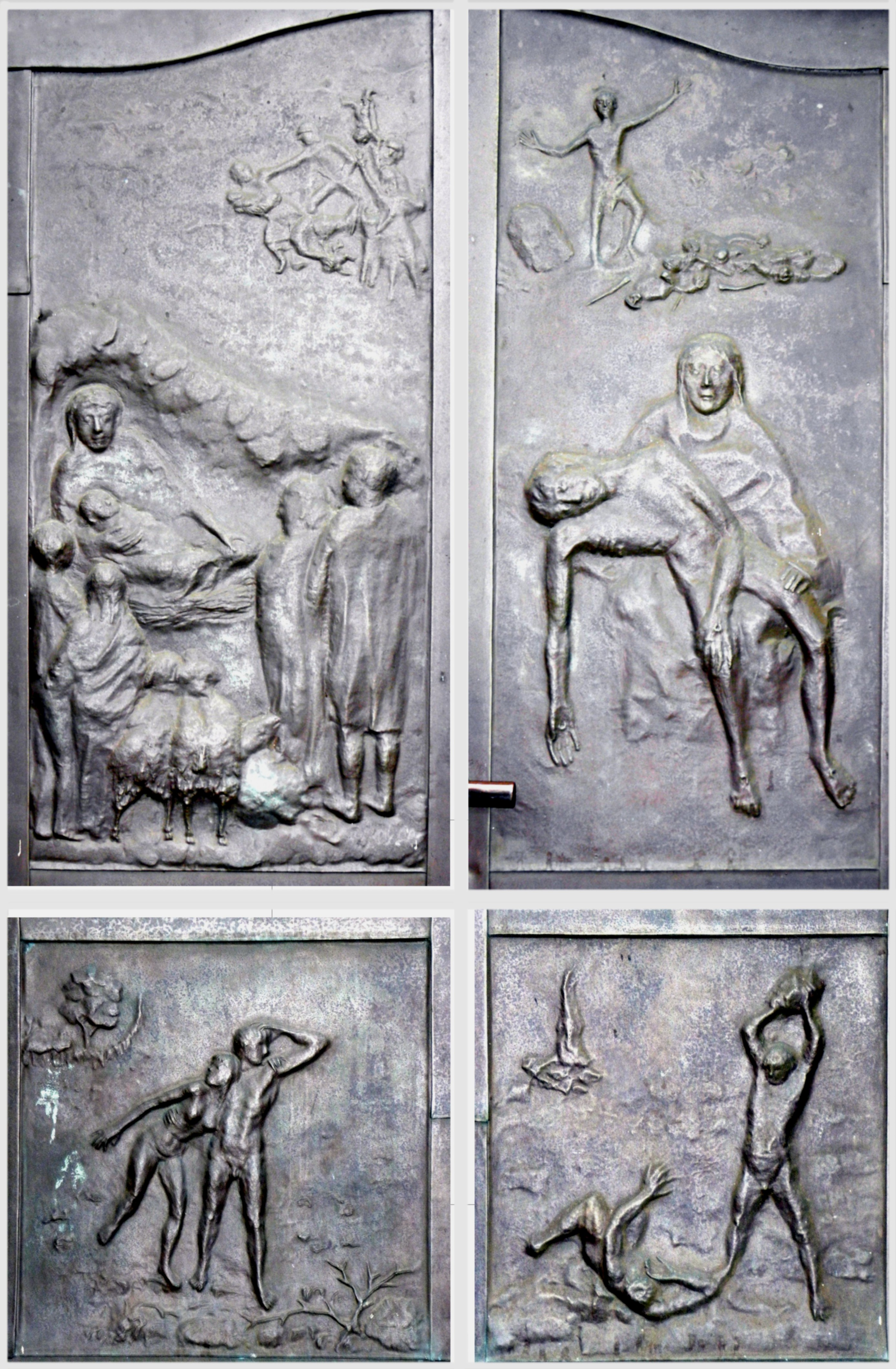 vierteiliges Türrelief Marienkirche in Biesenthal, hergestellt von Friedrich Schötschel